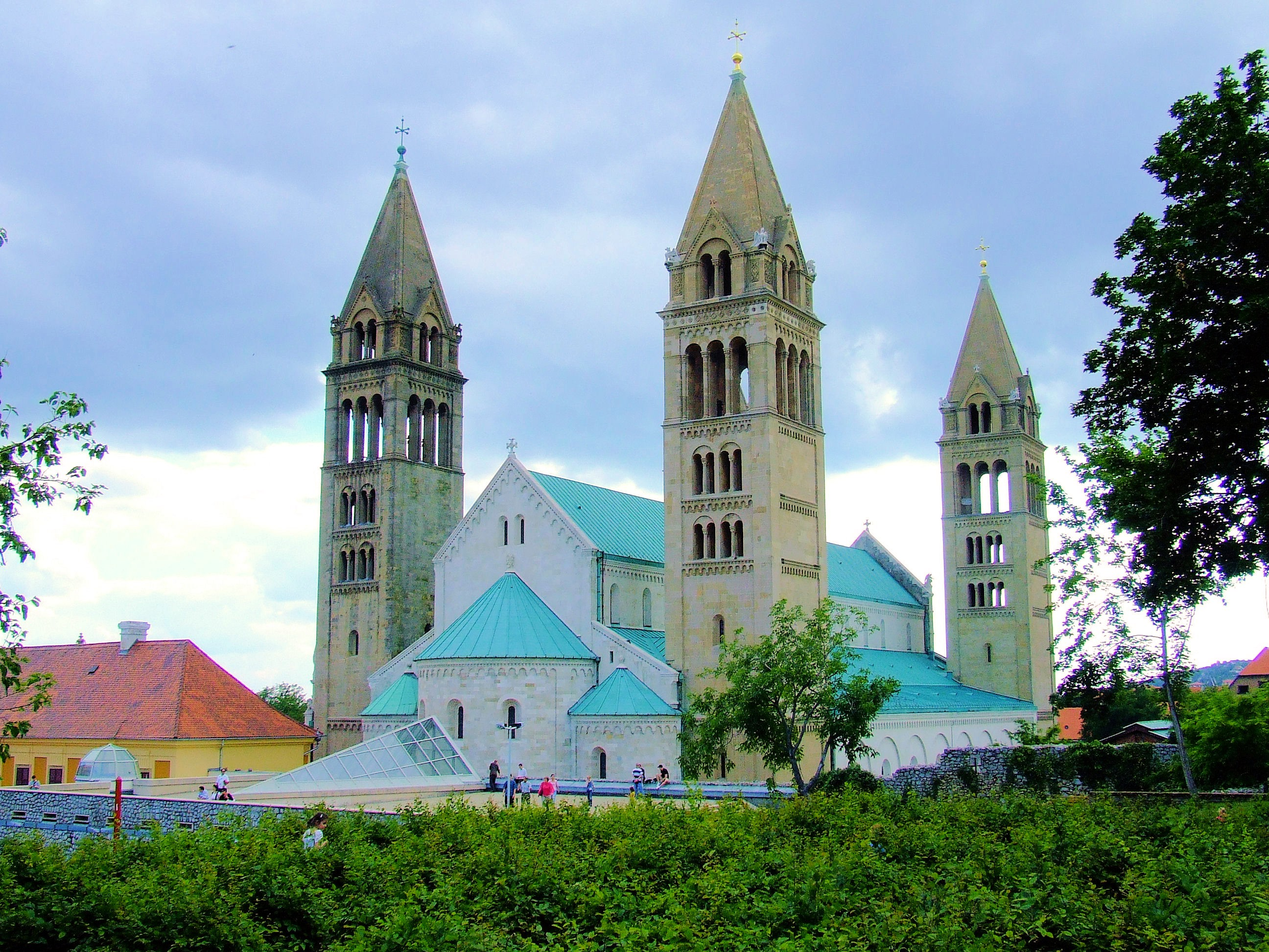 A pécsi katedrális